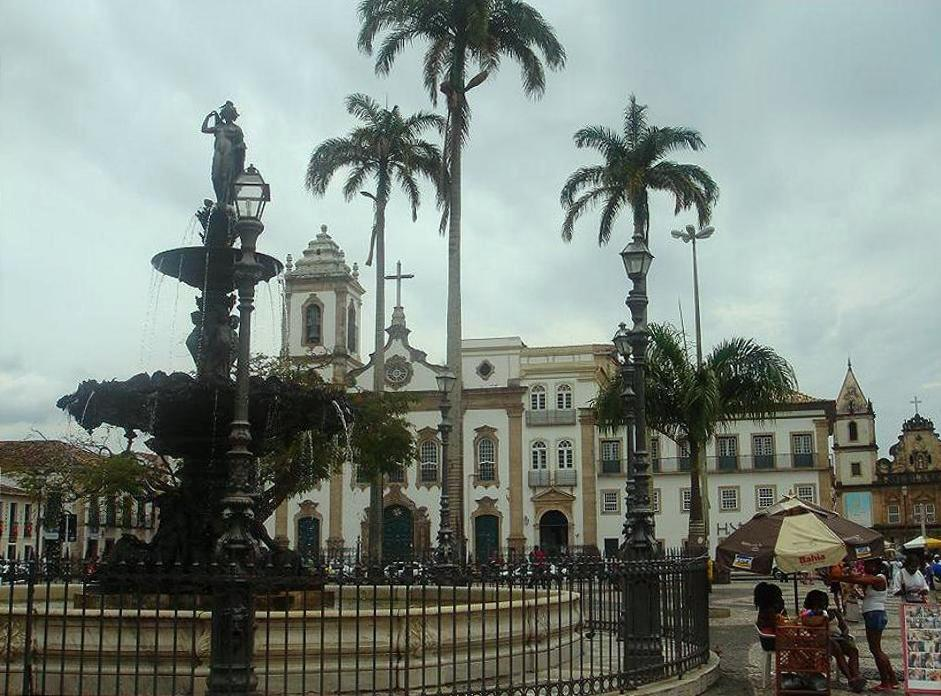 Igreja e Casa da Ordem Terceira de São Domingos